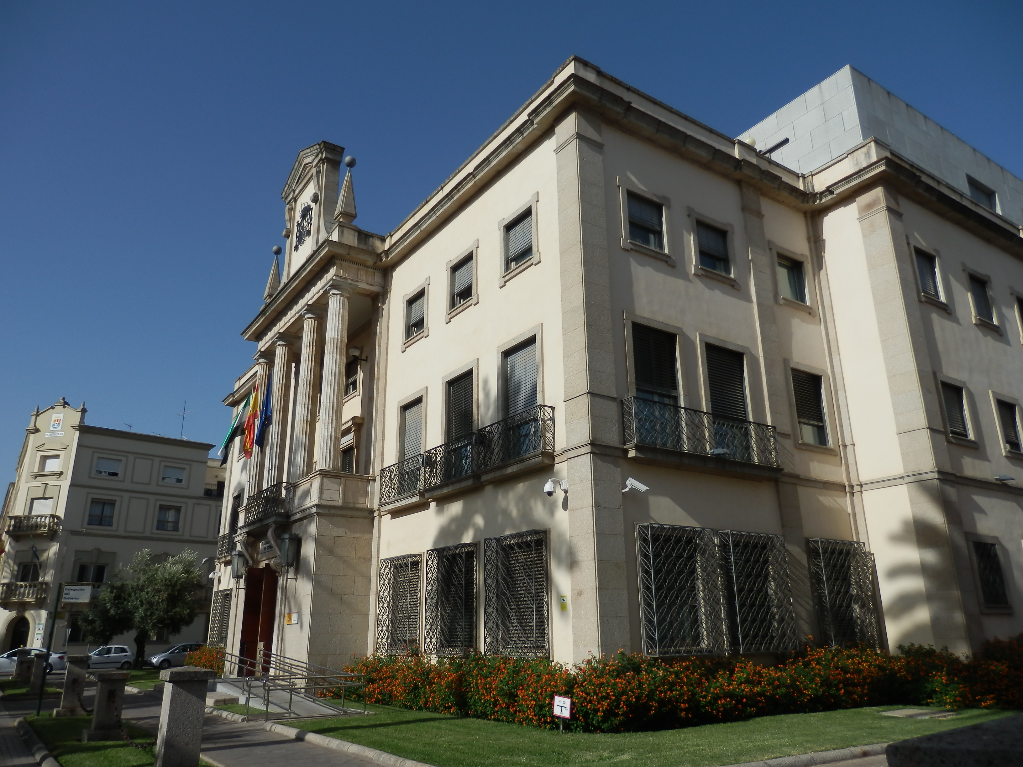 Sede en Badajoz de la Delegación y Subdelegación del Gobierno de España en Comunidad Autónoma de Extremadura.